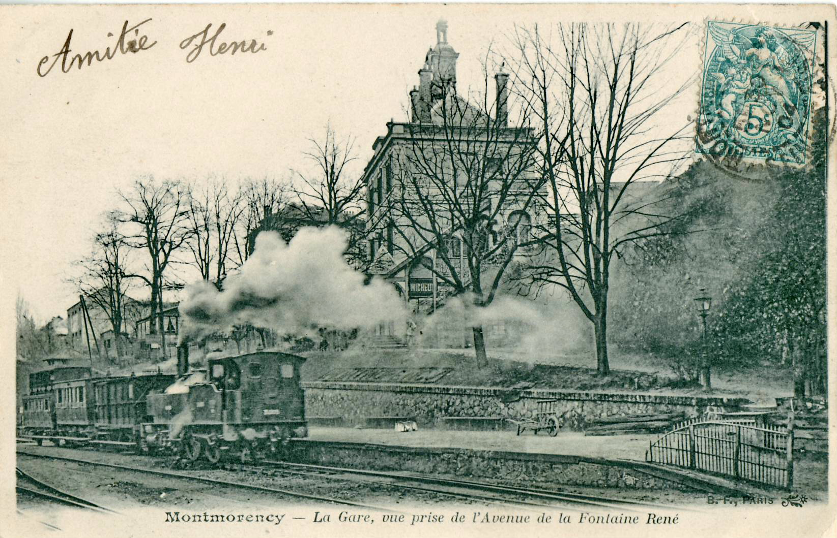 Carte postale ancienne éditée par BF à Paris :Montmorency - La Gare (du Refoulons) vue de l'avenue de la Fontaine René